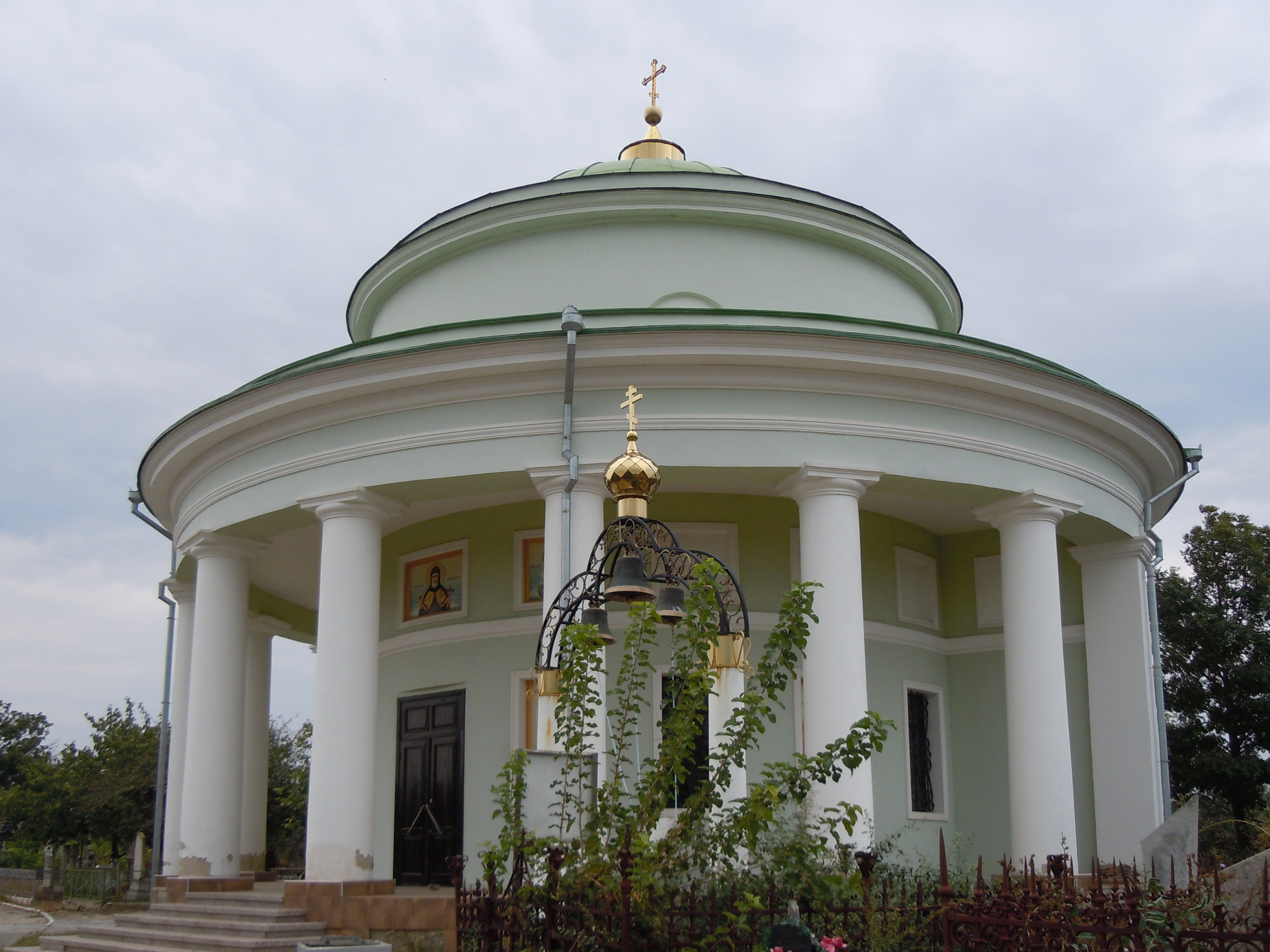 Мавзолей Інзова (Митрофанівська церква), Болград, Міське православне кладовище